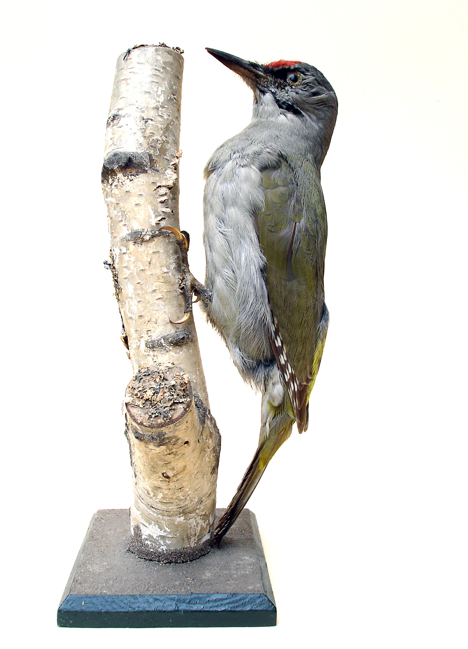 Präparat eines Grauspechts von Heinrich Zander